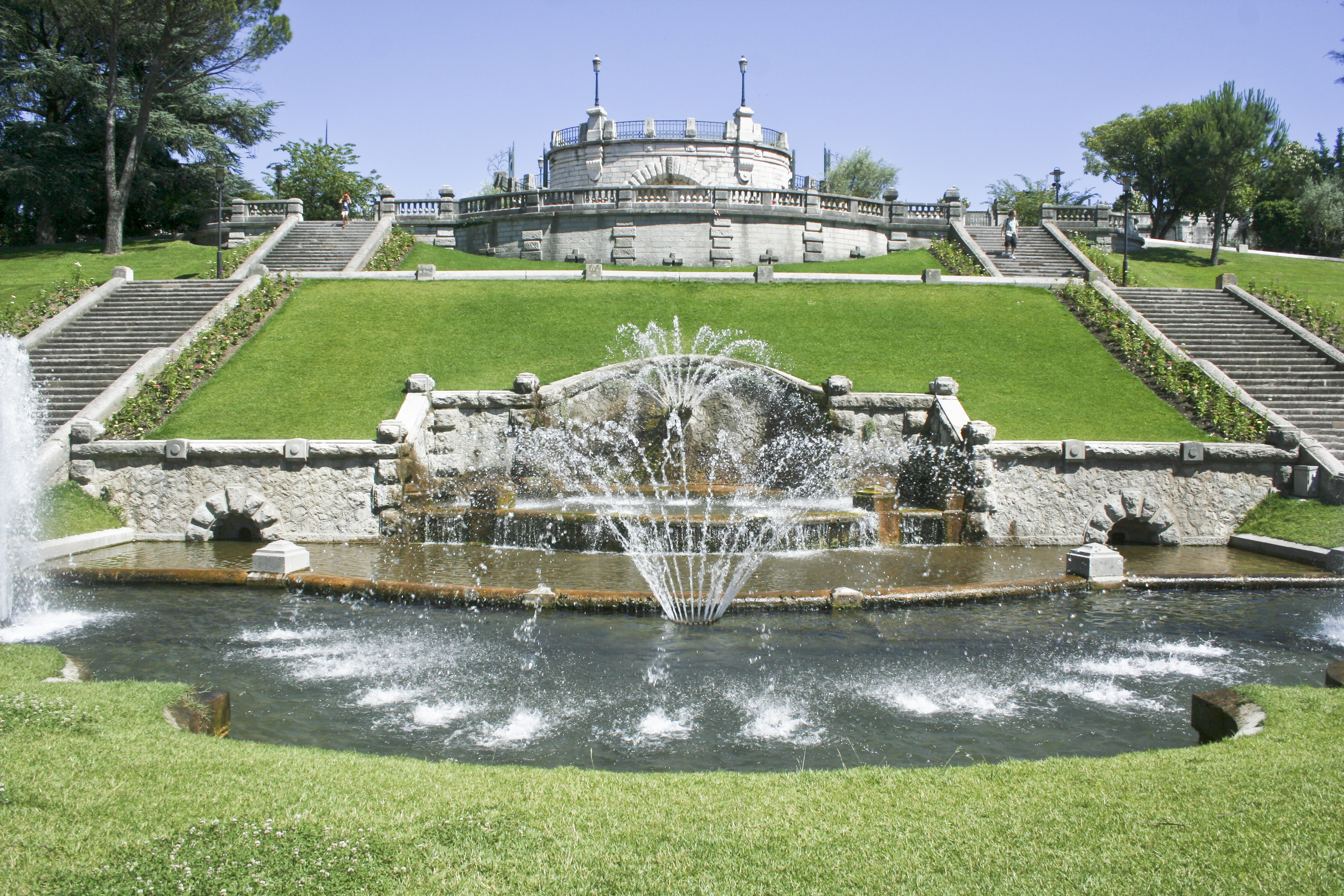 Parc Jouvet, Valence, Drôme, France, escalier monumental